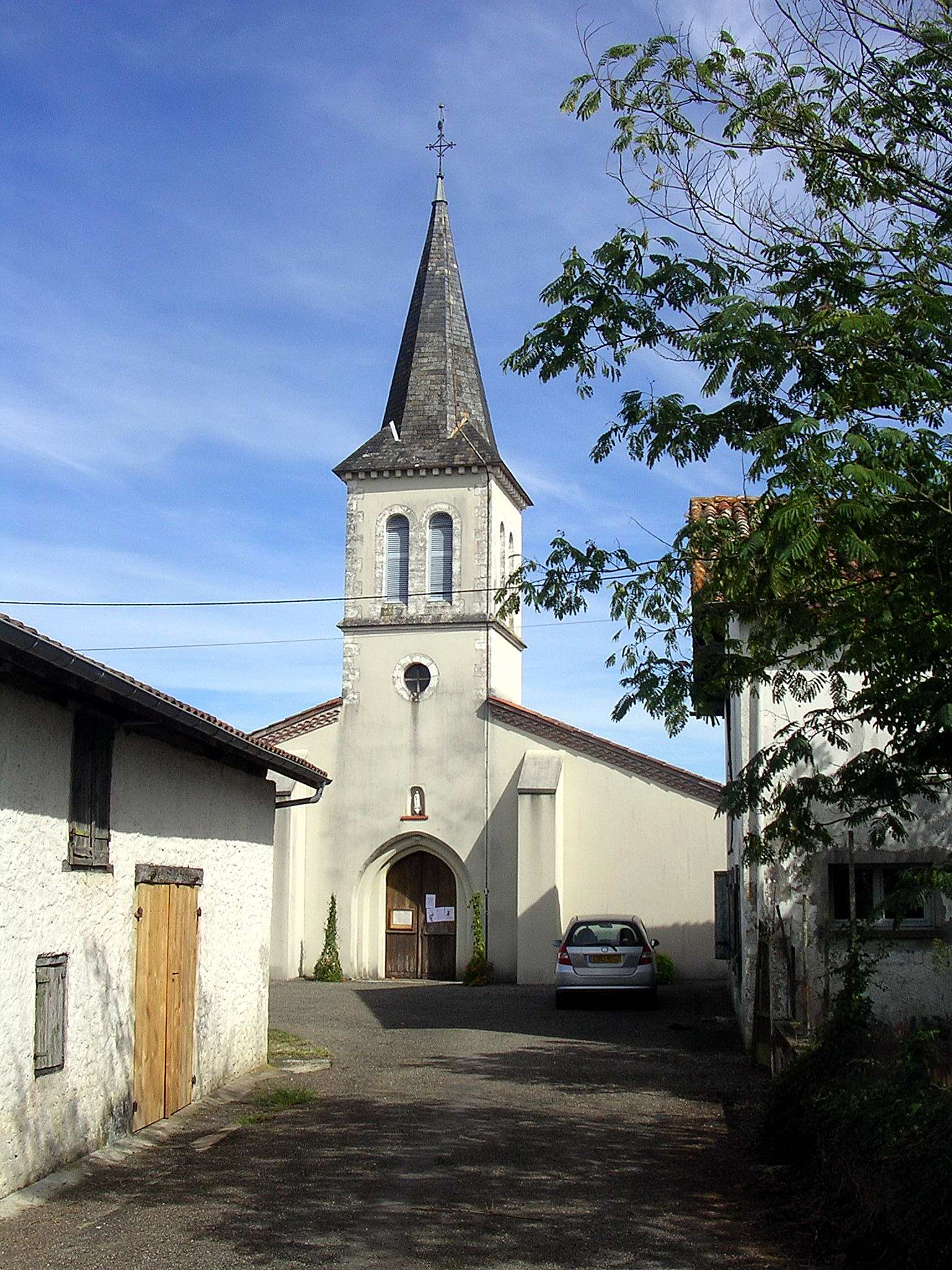 Chapelle de Lagastet à Aurice, dans le département français des Landes